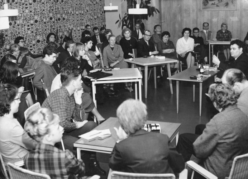 Zentralbild/Hochneder 28.11.1964 Ein Gespräch mit Erik Neutsch (Hintergrund rechts) über seinen Roman "Spur der Steine" fand am 27.11.1964 in der Berthold-Brecht-Bibliothek in der Berliner Karl-Marx-Allee statt, zu der die Kommission für politische und kulturelle Massenarbeit des Wohngebietes VII Berlin-Mitte eingeladen hatte.